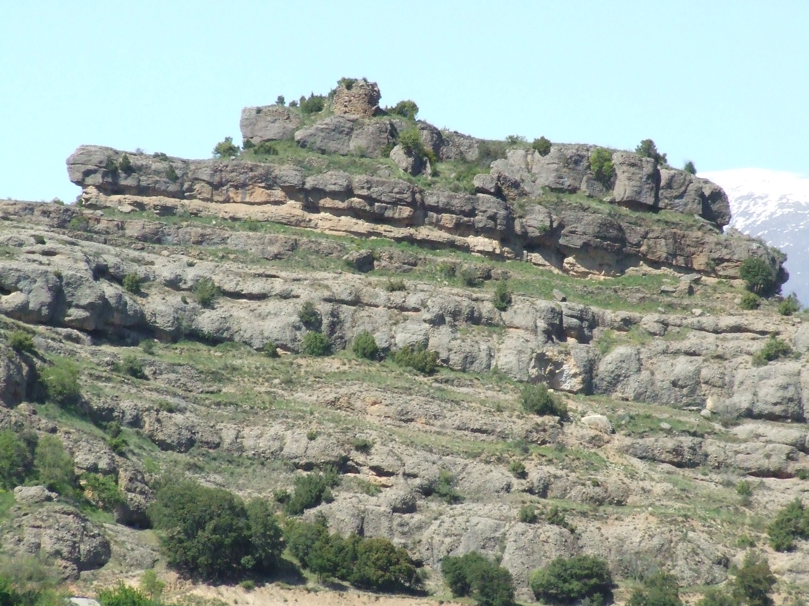 El Castell de Toralla (Toralla i Serradell, Conca de Dalt, Pallars Jussà)